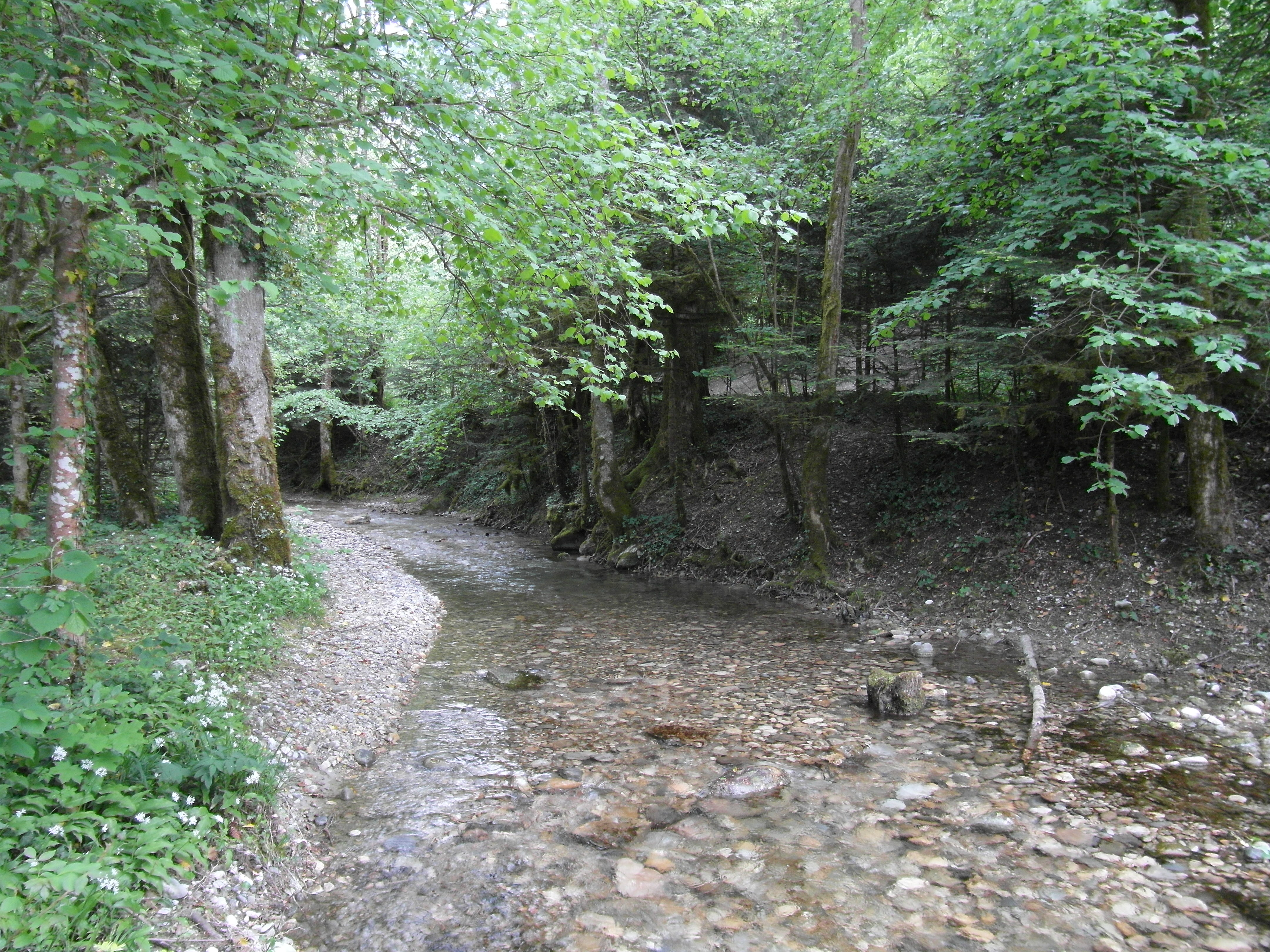 ruisseau de Cholorant